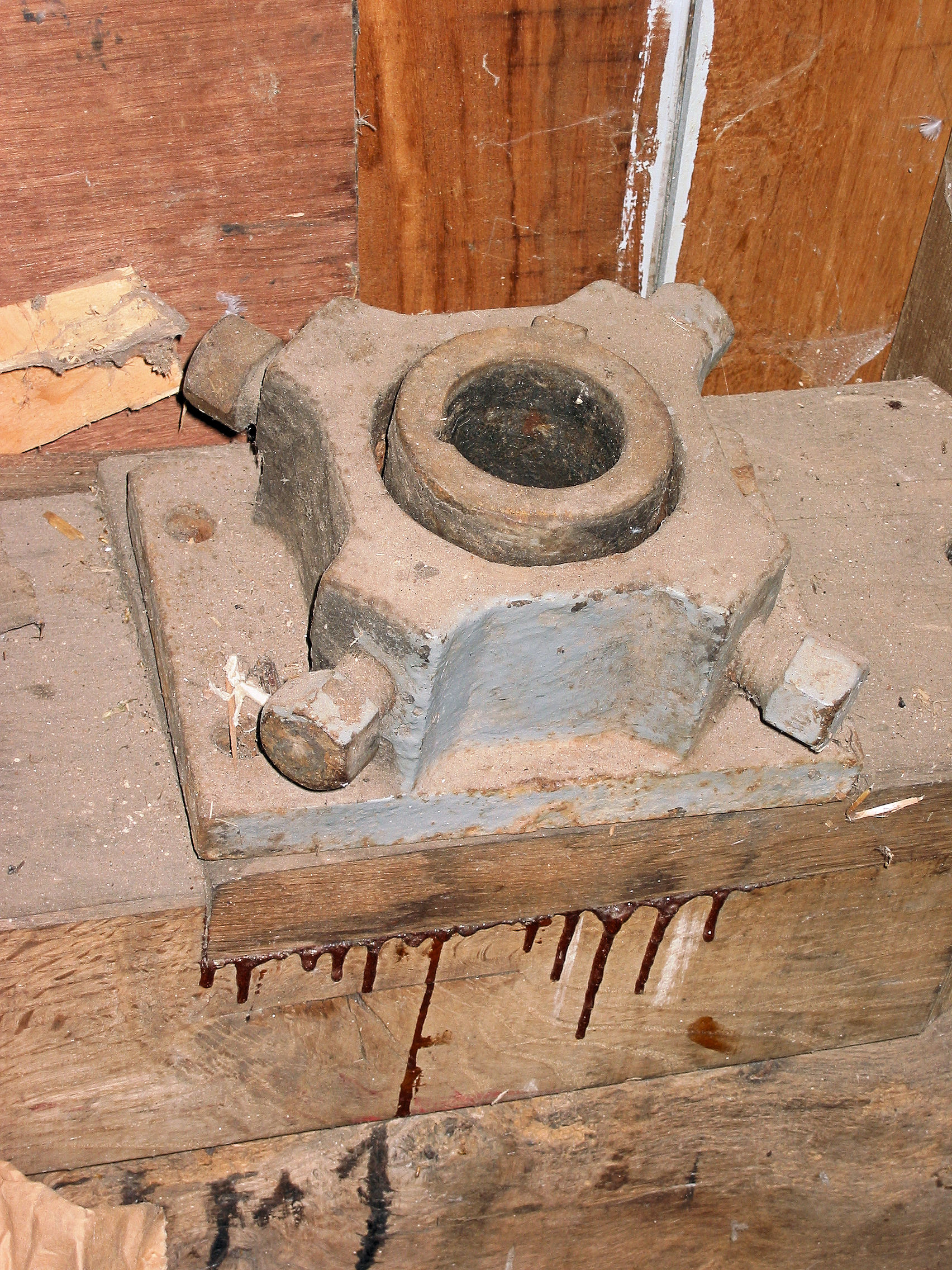 Taastpot koningsspil, Molen Tot Voordeel en Genoegen in Alphen aan de Maas, the Netherlands